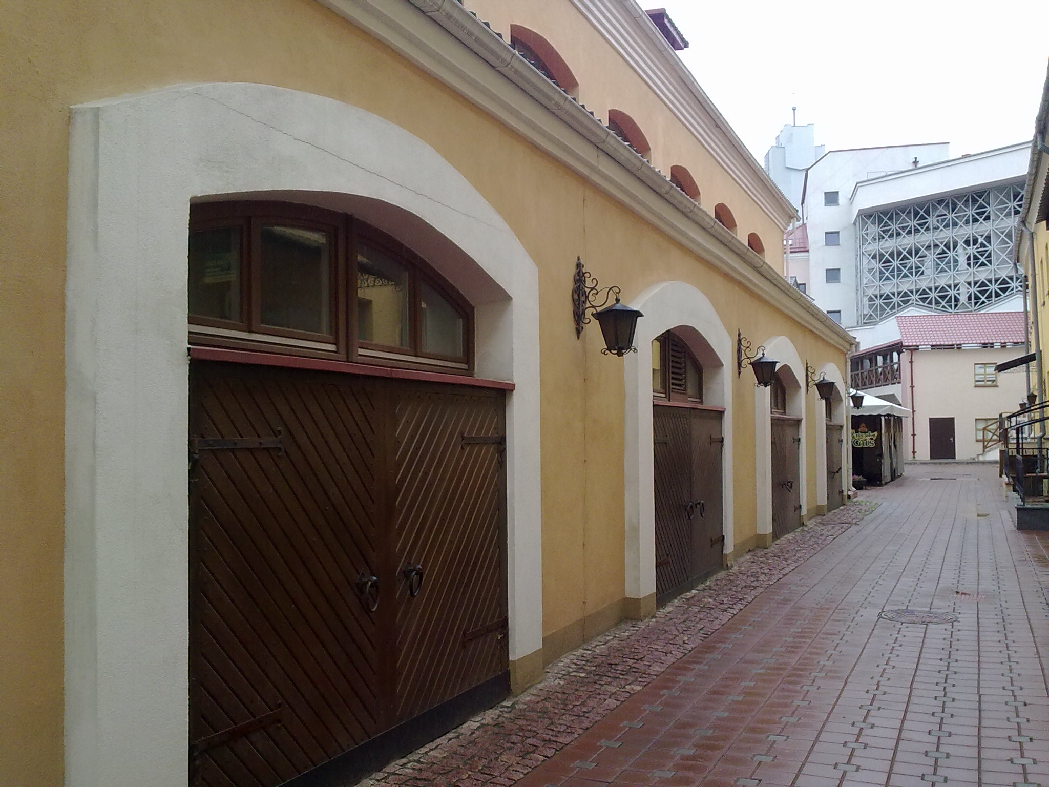 Мінск. Вуліца Рэвалюцыйная. 2012